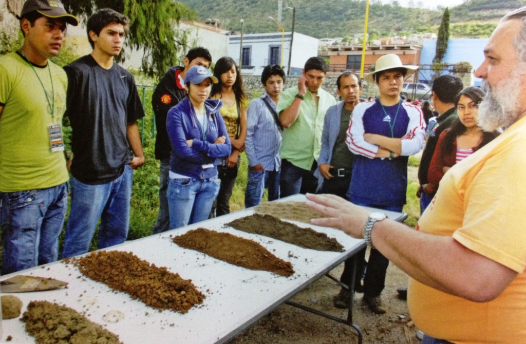 NHAC: Talleres de bioconstrucción gratuitos